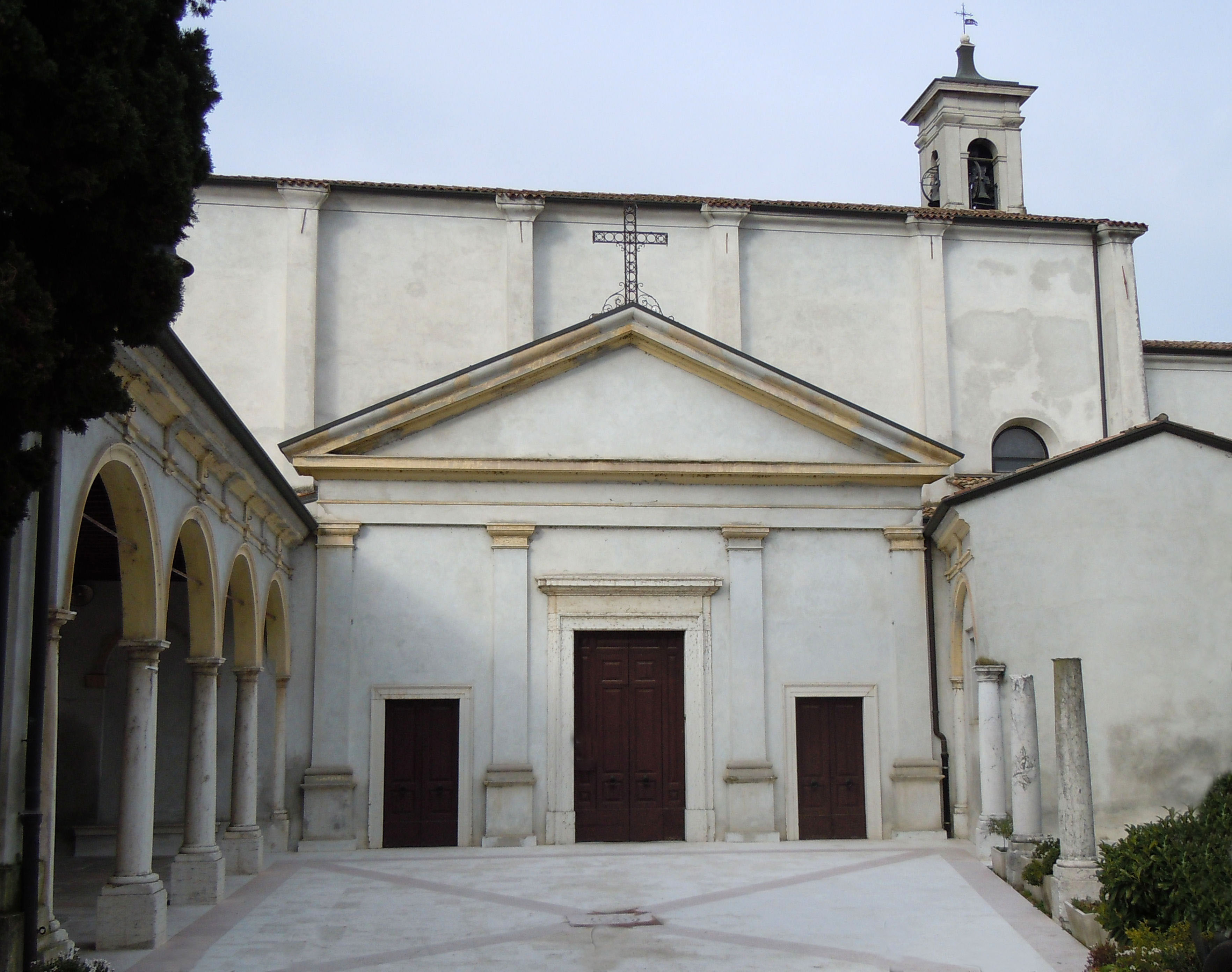 Rivoltella del Garda, chiesa di S. Biagio